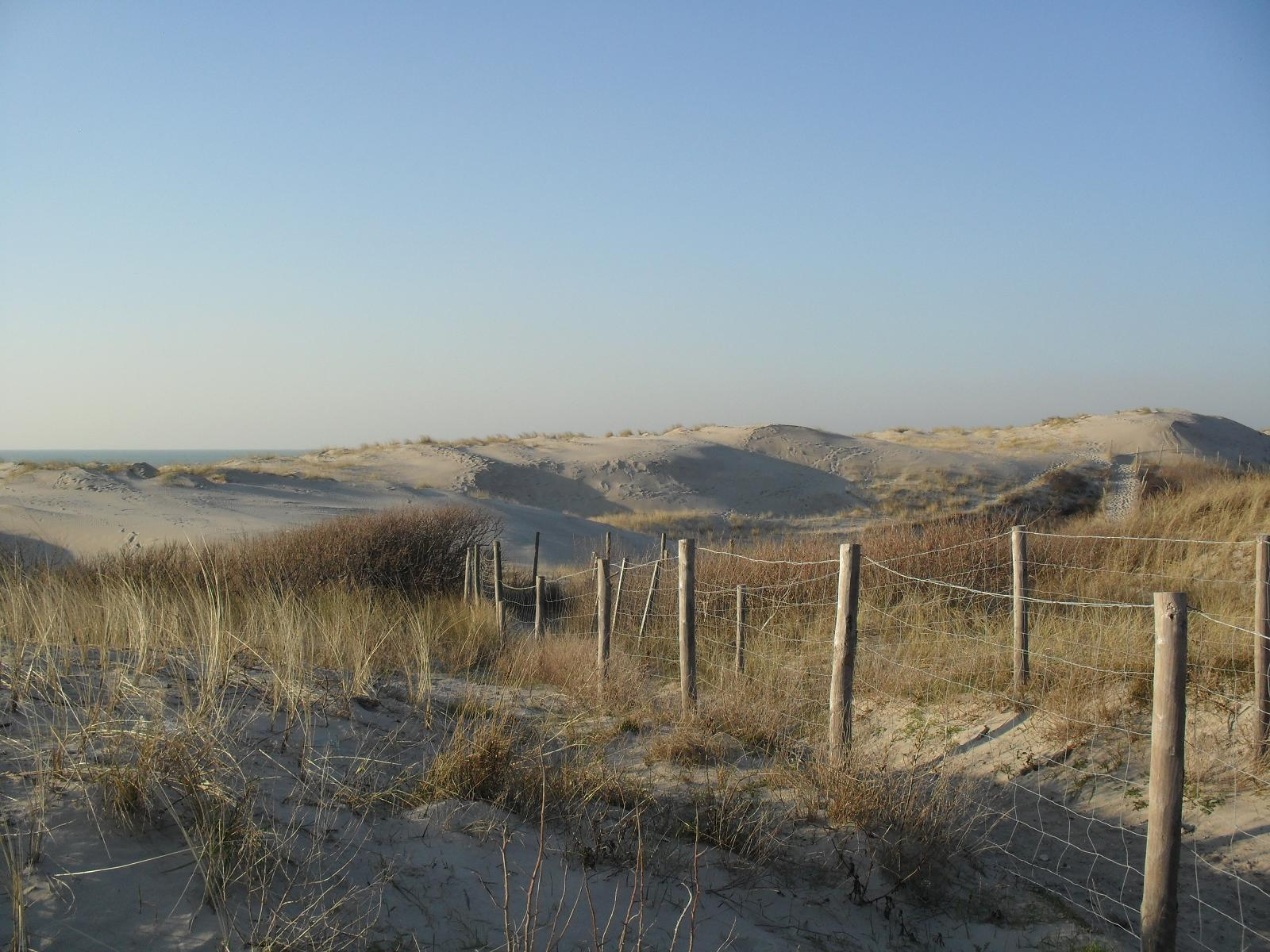 Les Dunes du Touquet le long de la Promenade de la Corniche - Le Touquet-Paris-Plage